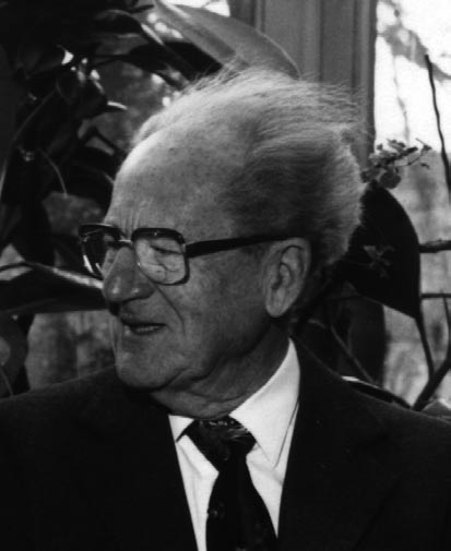 Albert Schlagbauer Regierungsschuldirektor i.R. † 08. Oktober 2001 im Alter von 88 Jahren verstorben